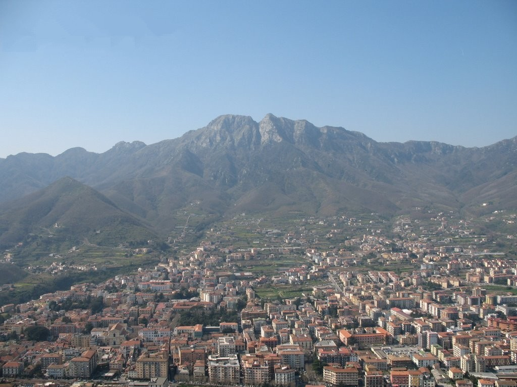 Cava de' Tirreni - Panorama da Monte Castello